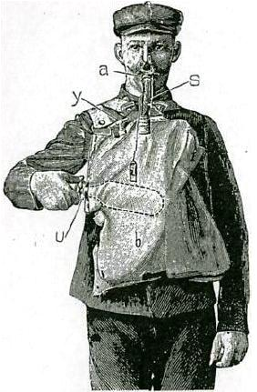 Pneumatophor Walcher-Gaertner (DRP Nr. 88 703). Erklärung: Atmungssack b, Sauerstoffzylinder c, Verschlussventil u, Atmungsschlauch S, Mundstück a, vom Unternehmen Waldek, Wagner & Benda hergestellt.